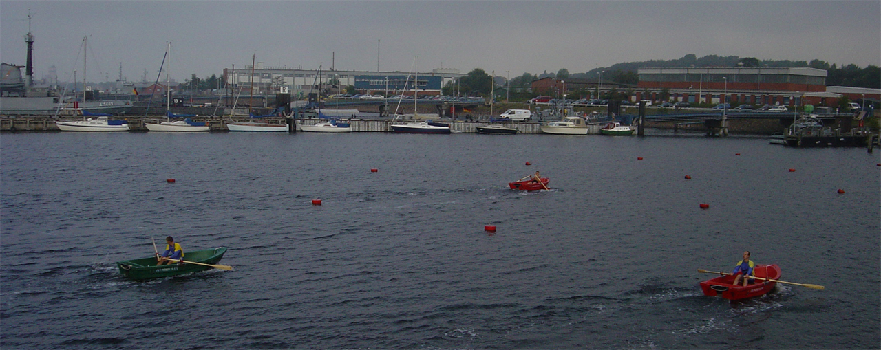 Sjömanskap i marinfemkamp. Från Eckenförde, Tyskland Em2004.